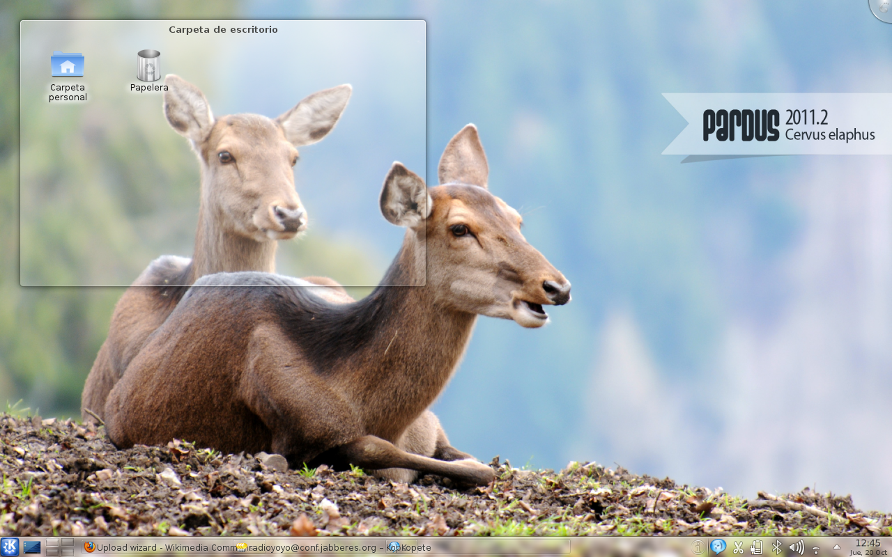 El escritorio de pardus mostrando KDE